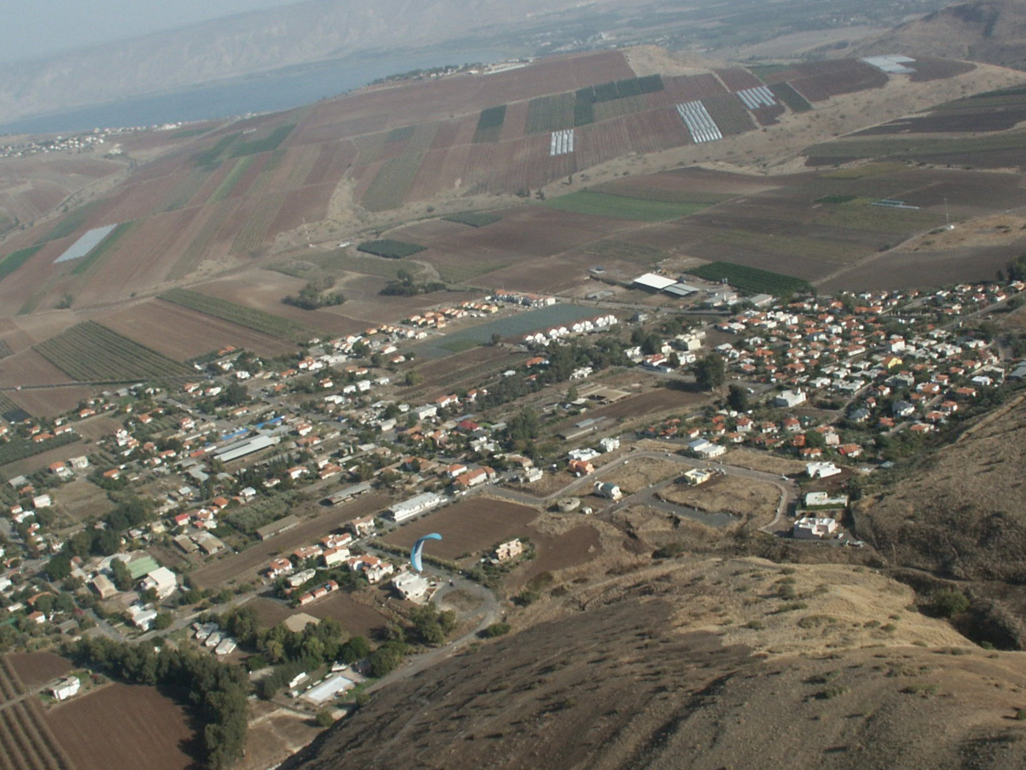 Yavne'el - Northern Israel